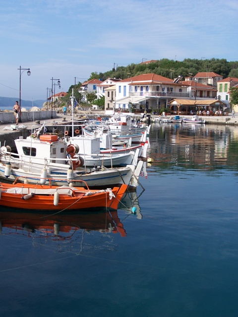 Kalamos Village on Kalamos Island, Lefkada, Greece